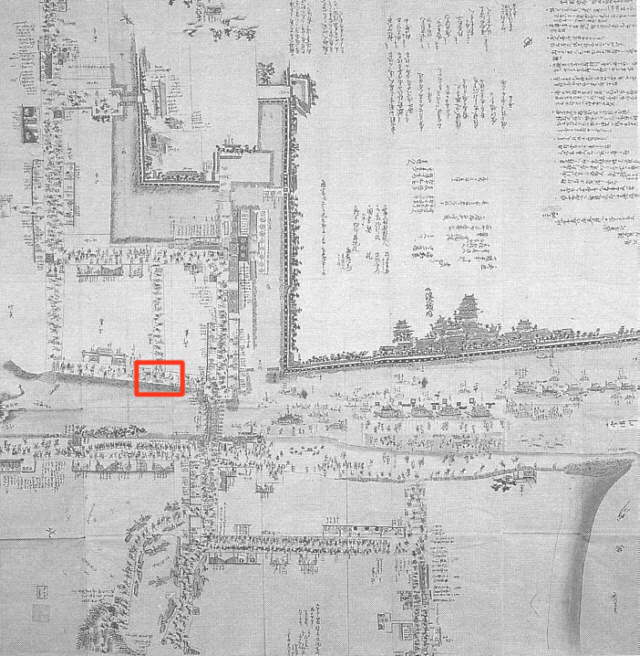 延享度(1748年)の朝鮮通信使の船団が淀藩に到着した様子を描いたもの（原本は縦138.0cm、横139.9cmの彩色図） 赤枠内は拡大図あり